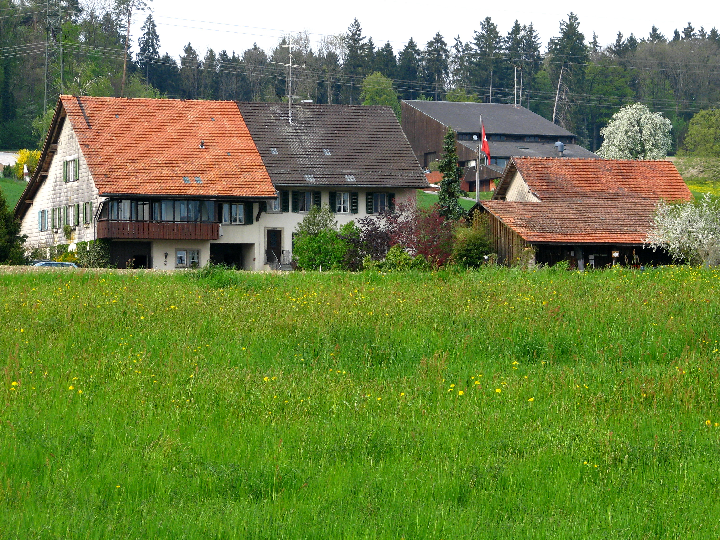 Katzenrüti near Rümlang as seen from Katzensee (oberer Katzensee)